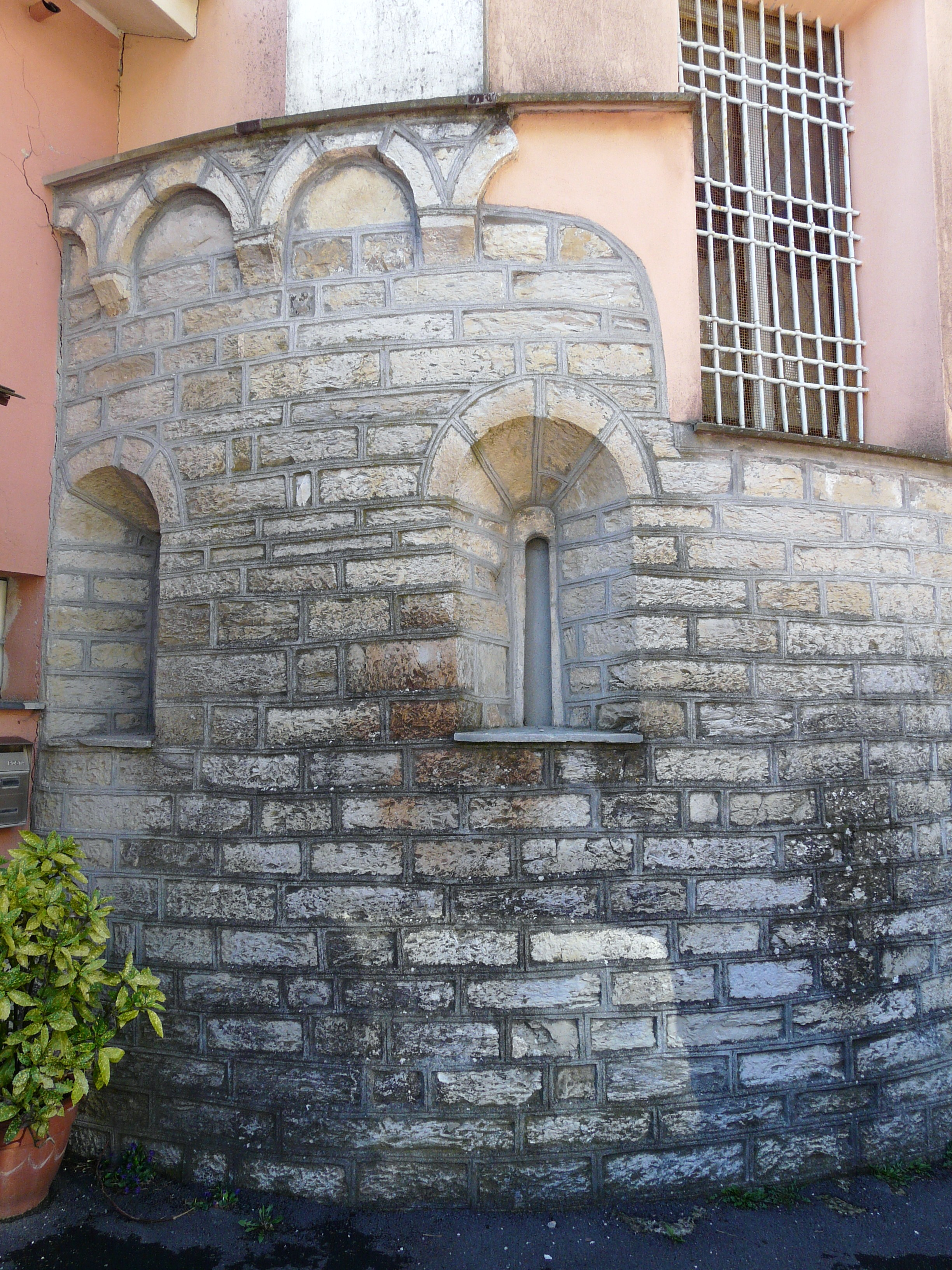 Chiesa di Santo Stefano, Rosso, Davagna, Liguria, Italia